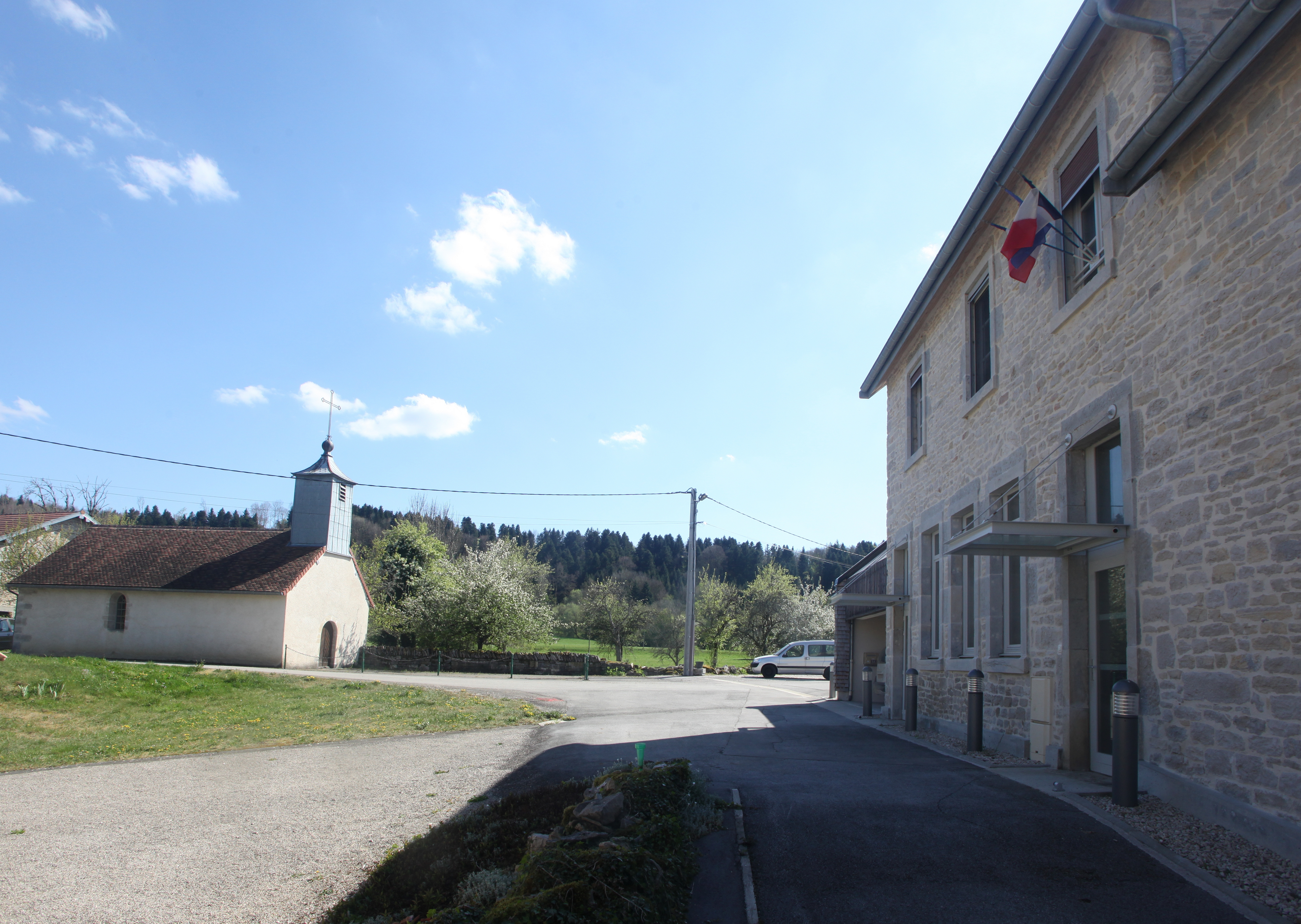 Chapelle et mairie de Saraz (Doubs).